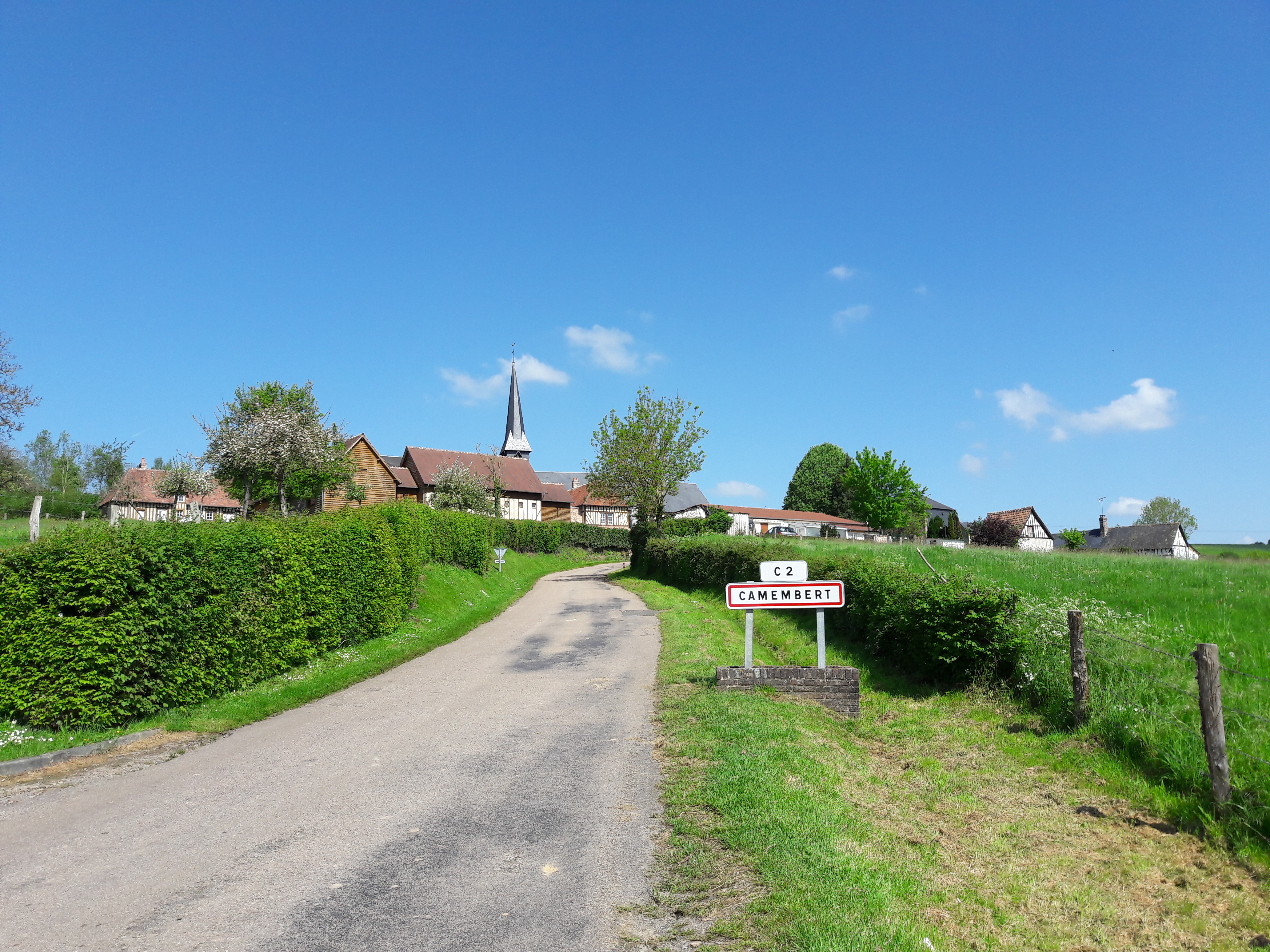 L'entrée du village de Camembert en mai 2016